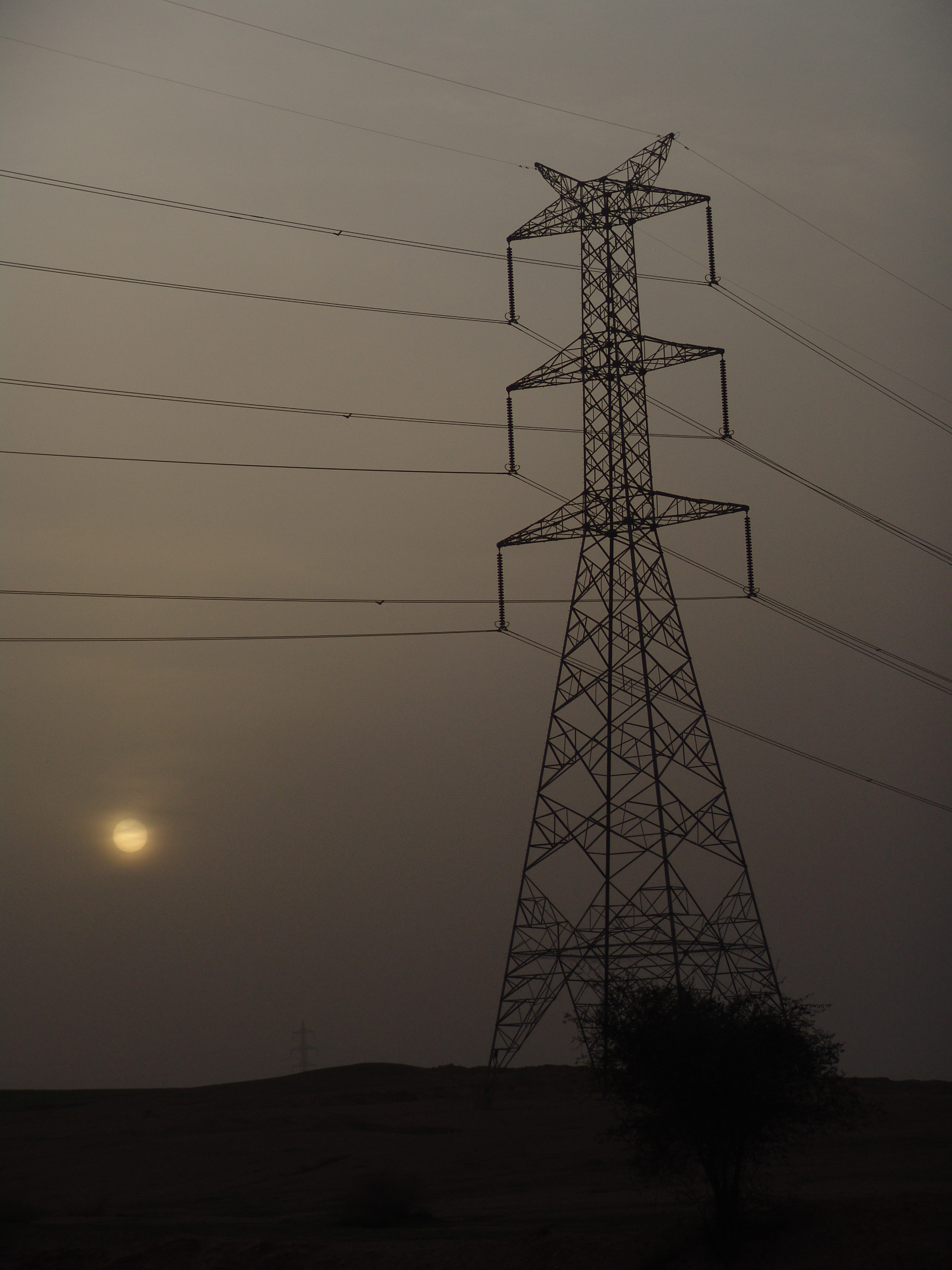 پایه ی برق فشار قوی